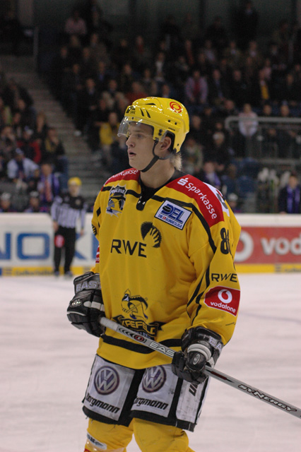 Daniel Pietta im Trikot der Krefeld Pinguine 2006